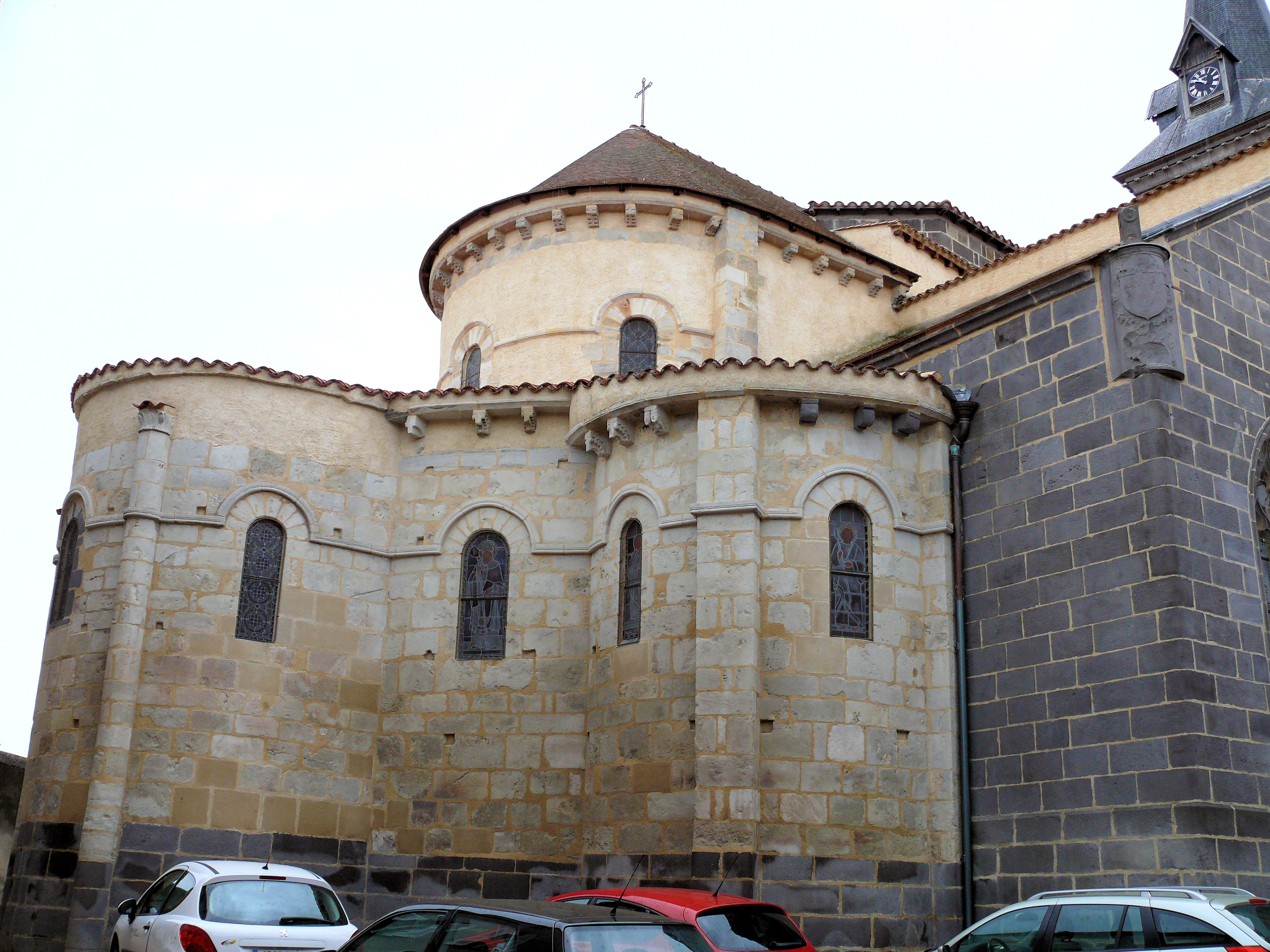 Maringues - Eglise - Chevet roman